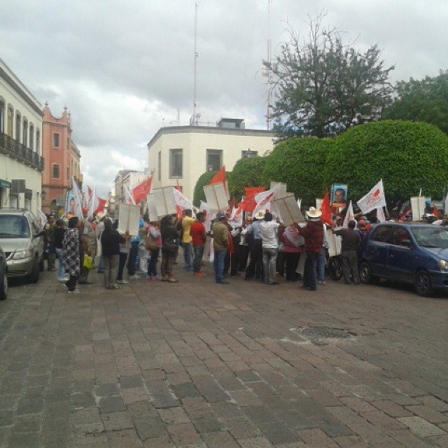 Alrededor de 50 integrantes de Antorcha Campesina bloquean, intermitentemente, el tránsito en la calle Juárez a la altura del jardín Zenea. Tome vías alternas.